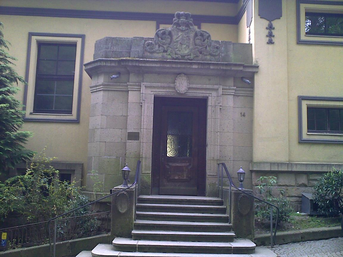 Corpshaus Hasso-Nassovia Marburg Eingang